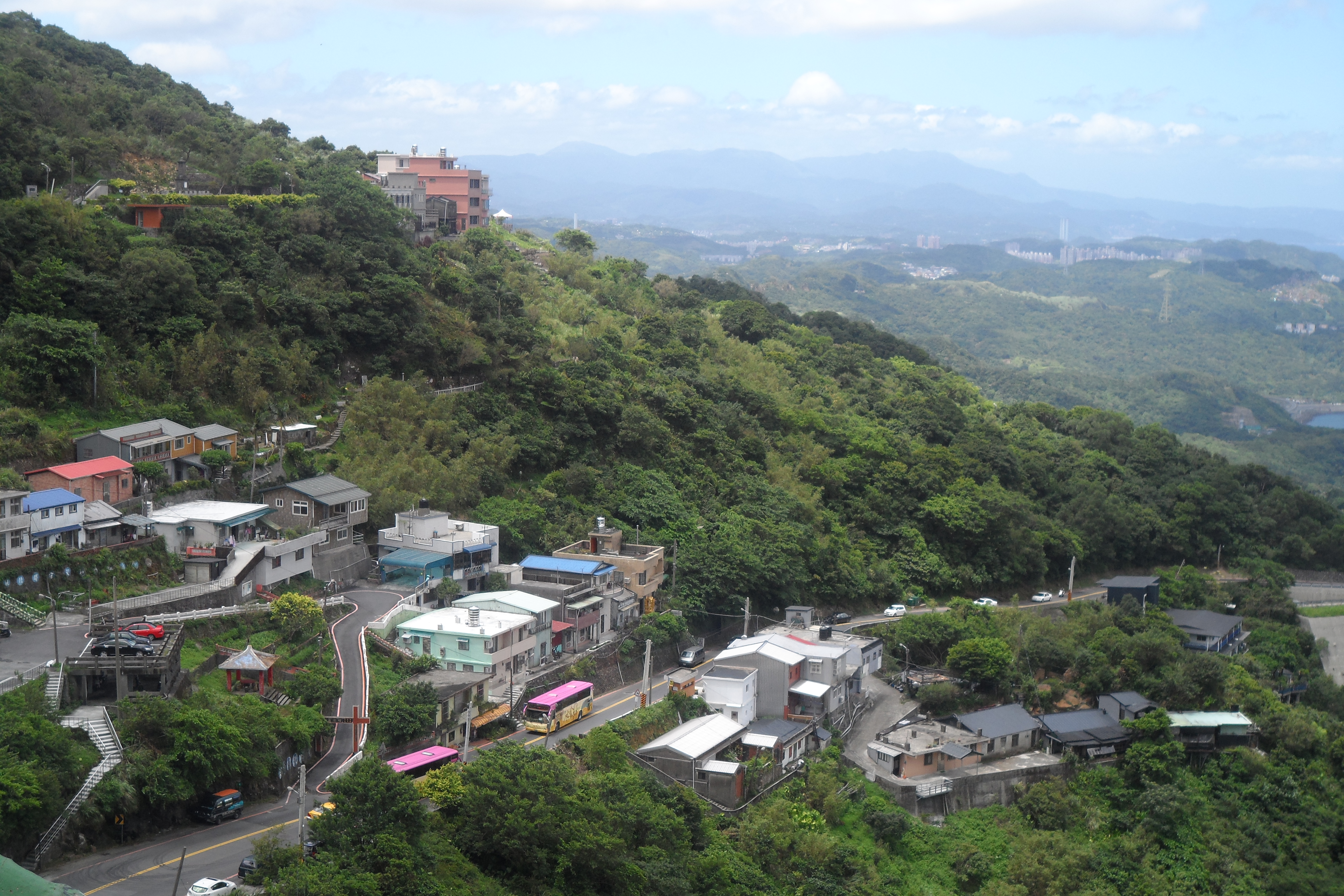 昔日九份因採礦而興盛，今各地觀光客大量湧入。